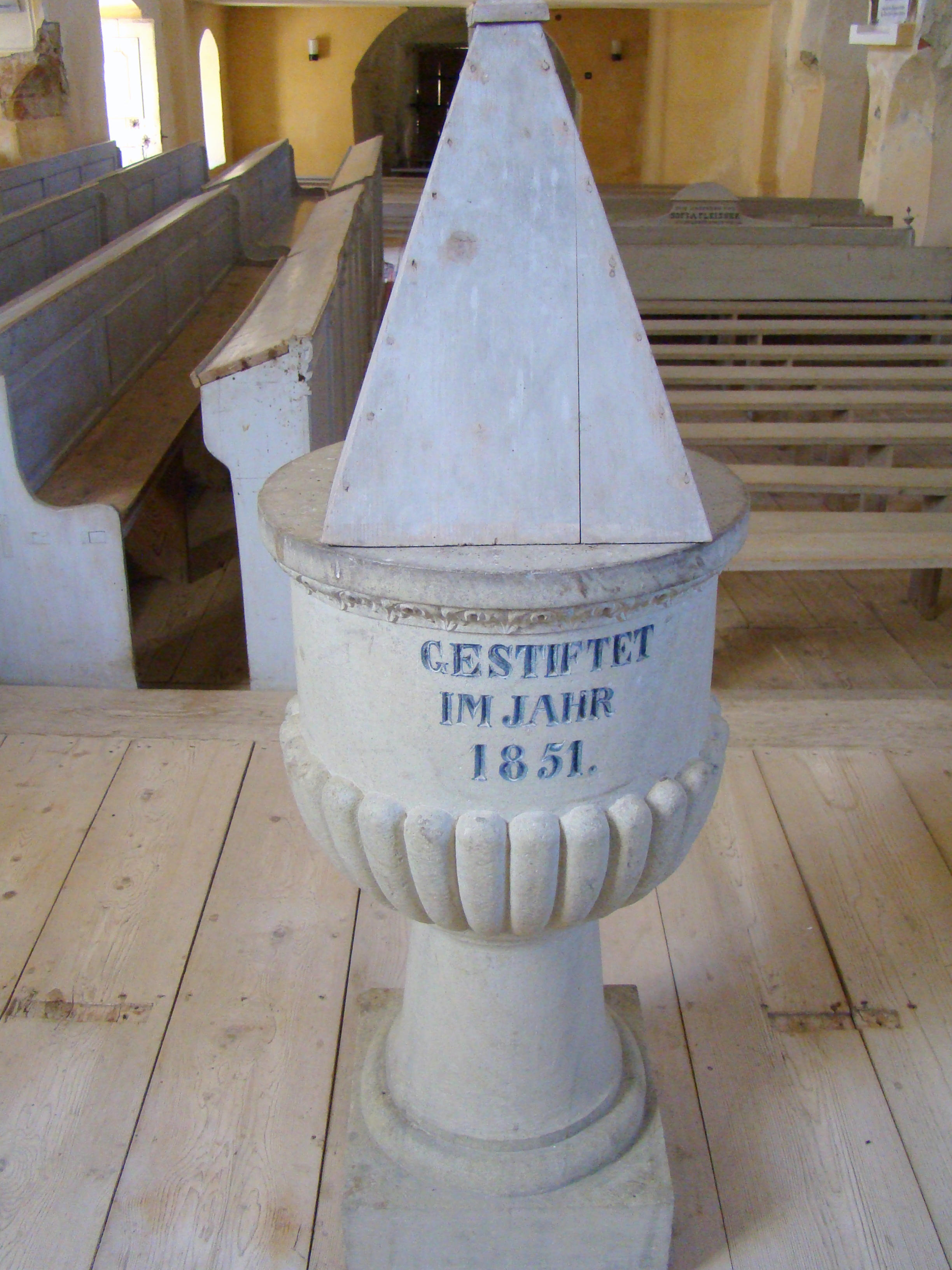 Biserica evanghelică, sat Rodbav; comuna Șoarș 115 sec. XIII-XIX